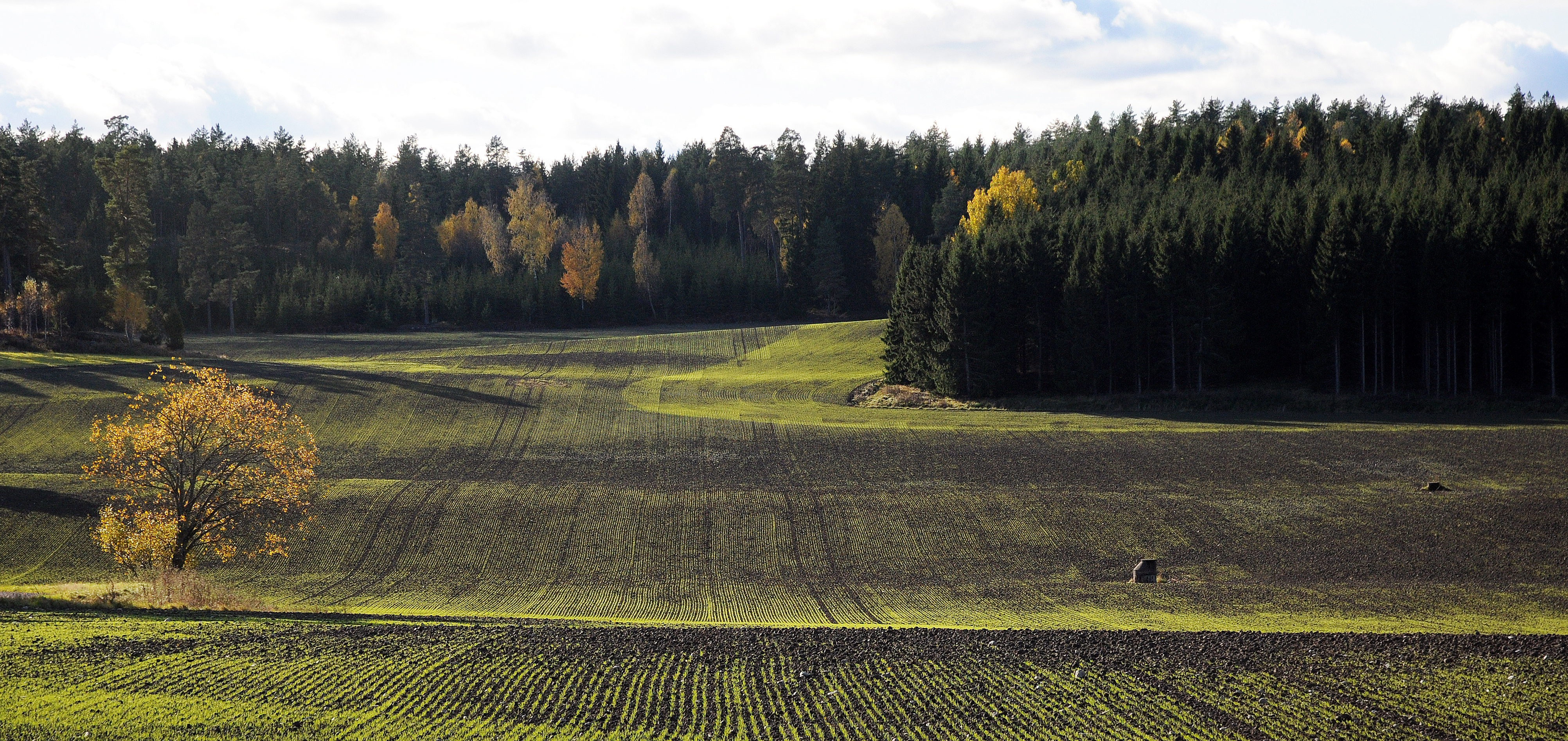 Höstsäd